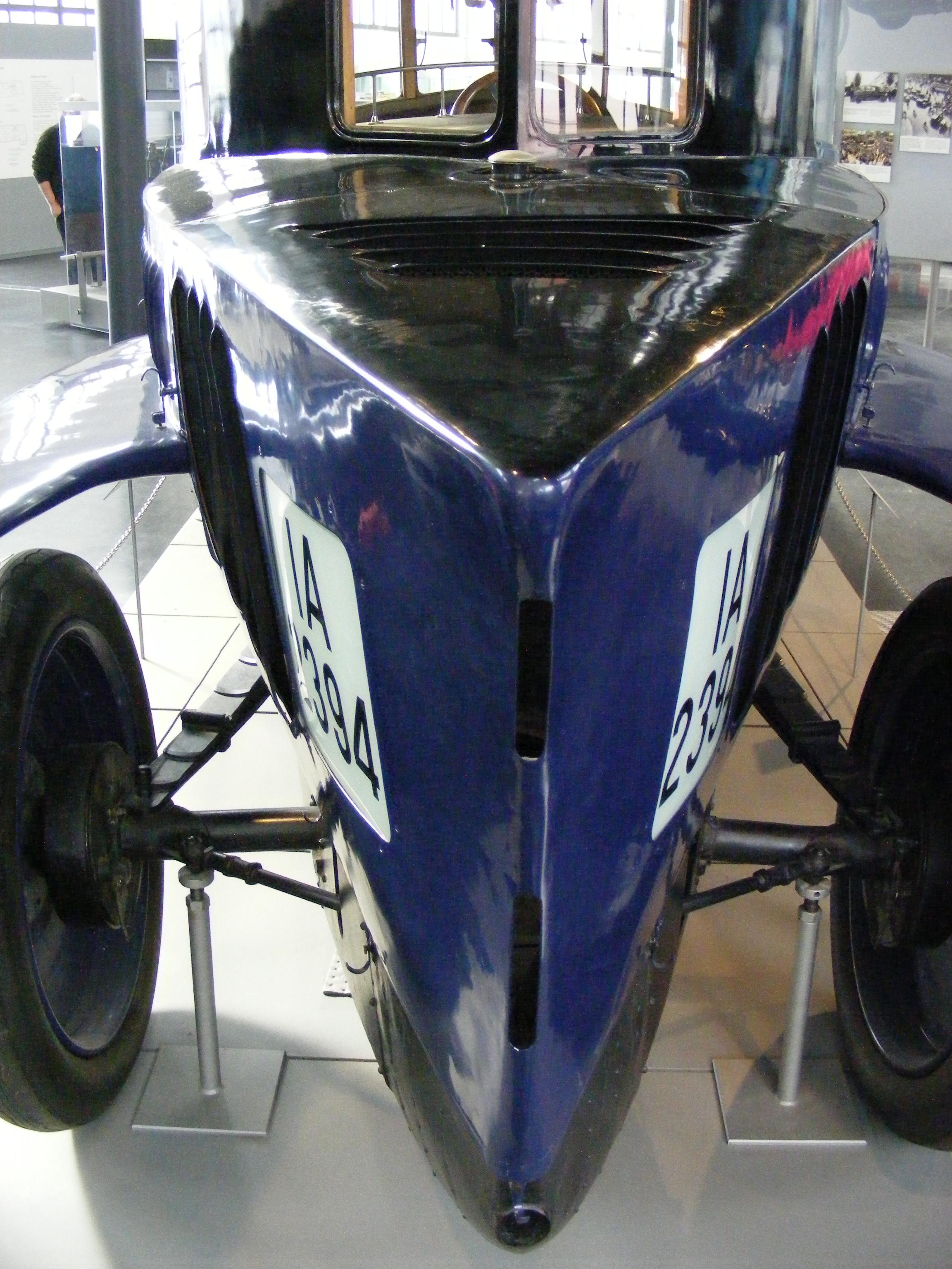 Rumpler-Tropfenwagen, Heck — Exponat im Deutschen Museum Verkehrszentrum München